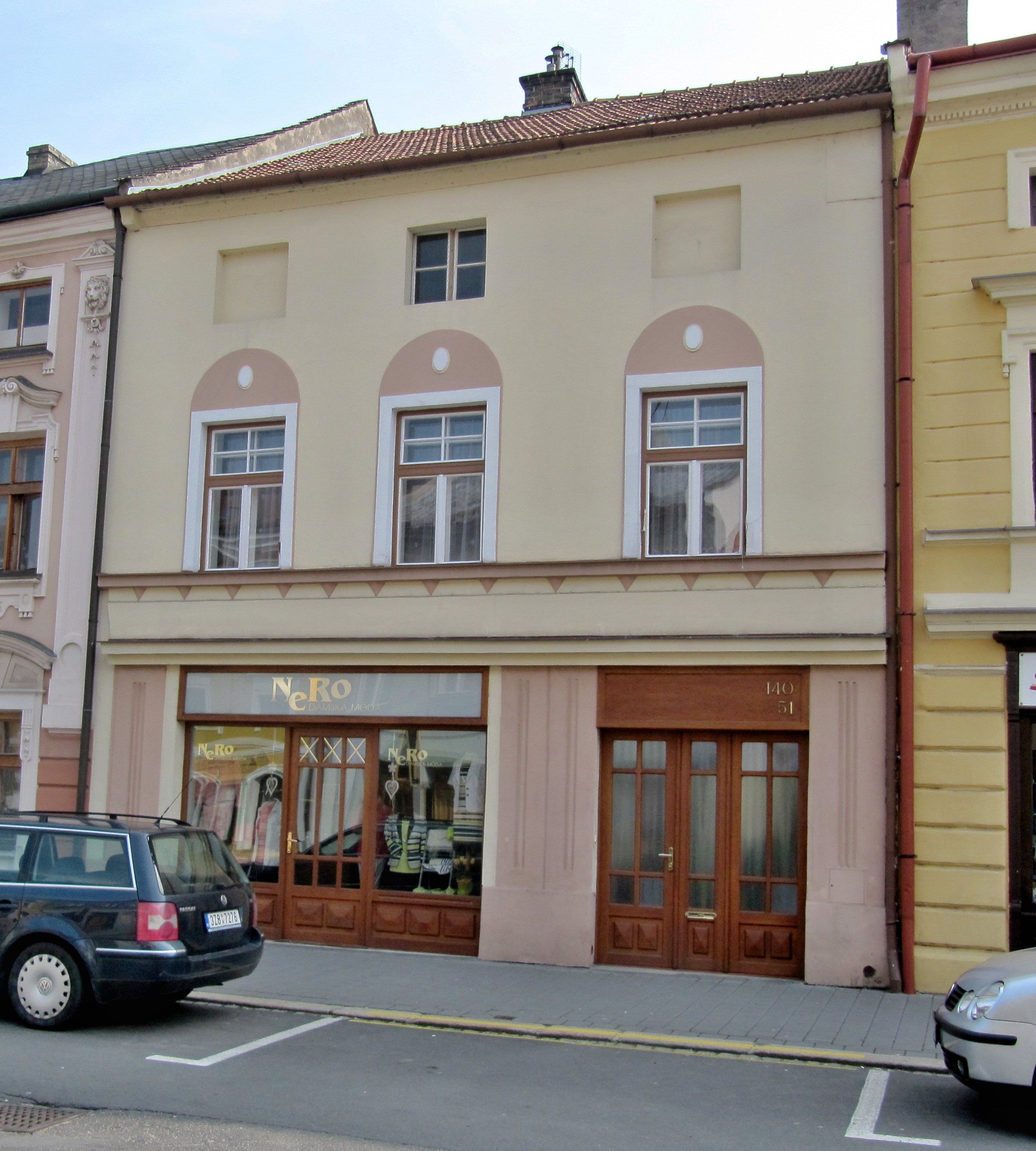 Měšťanský dům Hirnlův (Kroměříž), nám. Riegrovo 140/51, Kroměříž